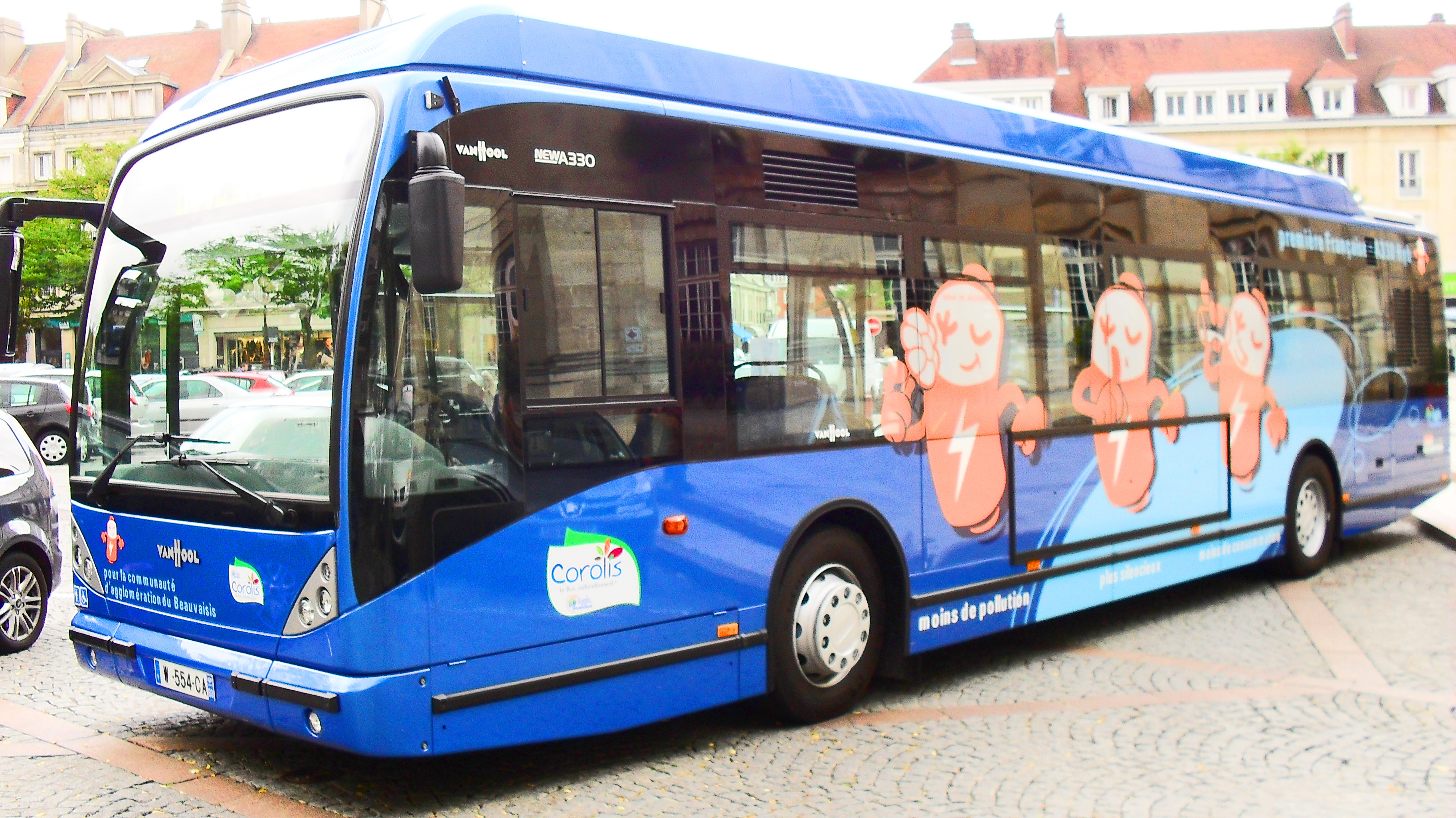 Un Van Hool A330 Hyb sur le réseau Corolis de Beauvais